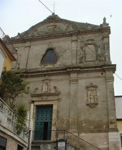 Descrizione: Chiesa di San Nicola di Mira Autore: Domenico Sergio Antonacci Data pubblicazione: 12/12/2009